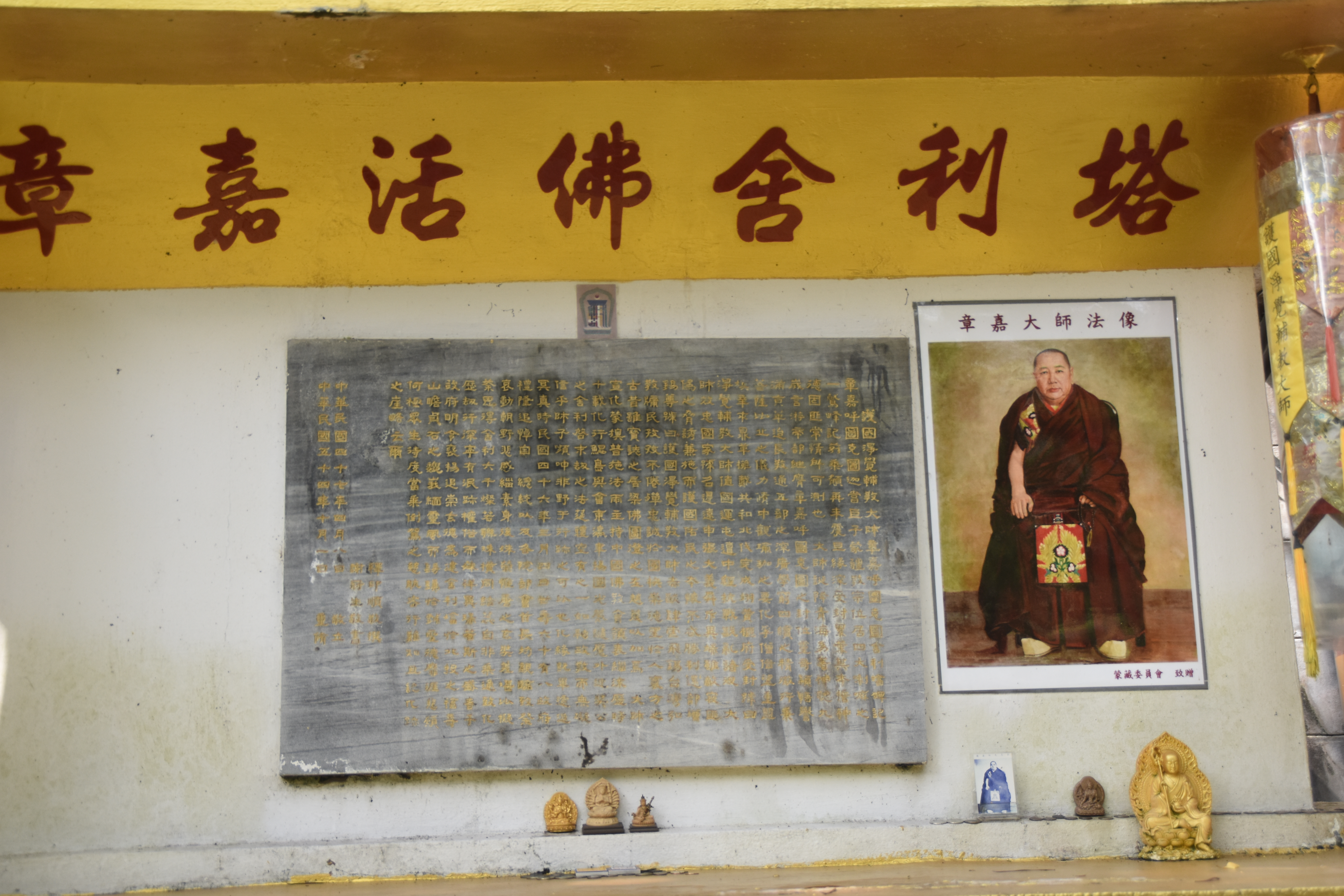 中文（台灣）: 章嘉活佛舍利塔塔蹟2，章嘉活佛在藏傳佛教史具有崇高地位，且為佛教界重要之領導人物，是西藏黃教格魯派之活佛中，自1949年後唯一來臺定居者，對於推動藏傳佛教在臺發展與安定當時人心有顯著貢獻。造型具藏式舍利塔之重要特徵，包括塔剎、瓶形塔身及基座等三段式造型，極富特色與稀有性，具歷史建築保存價值。 1290391,121.5032476 中和禪寺後方山坡